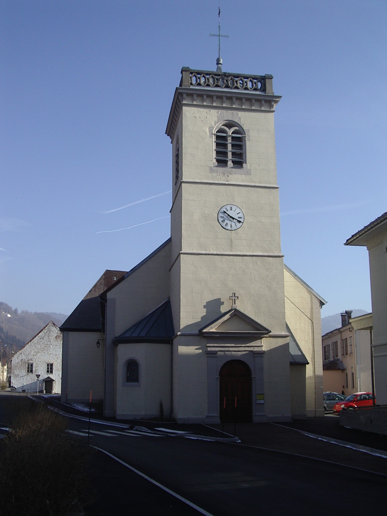 Eglise de Bussang (Vosges, 88)